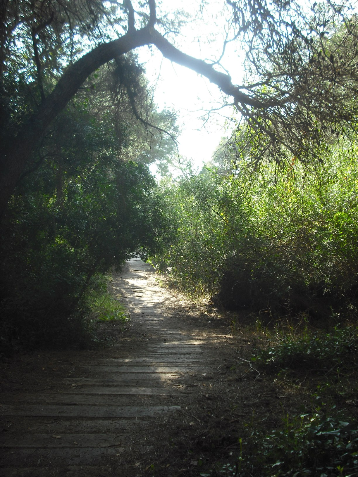 Devesa del Saler.